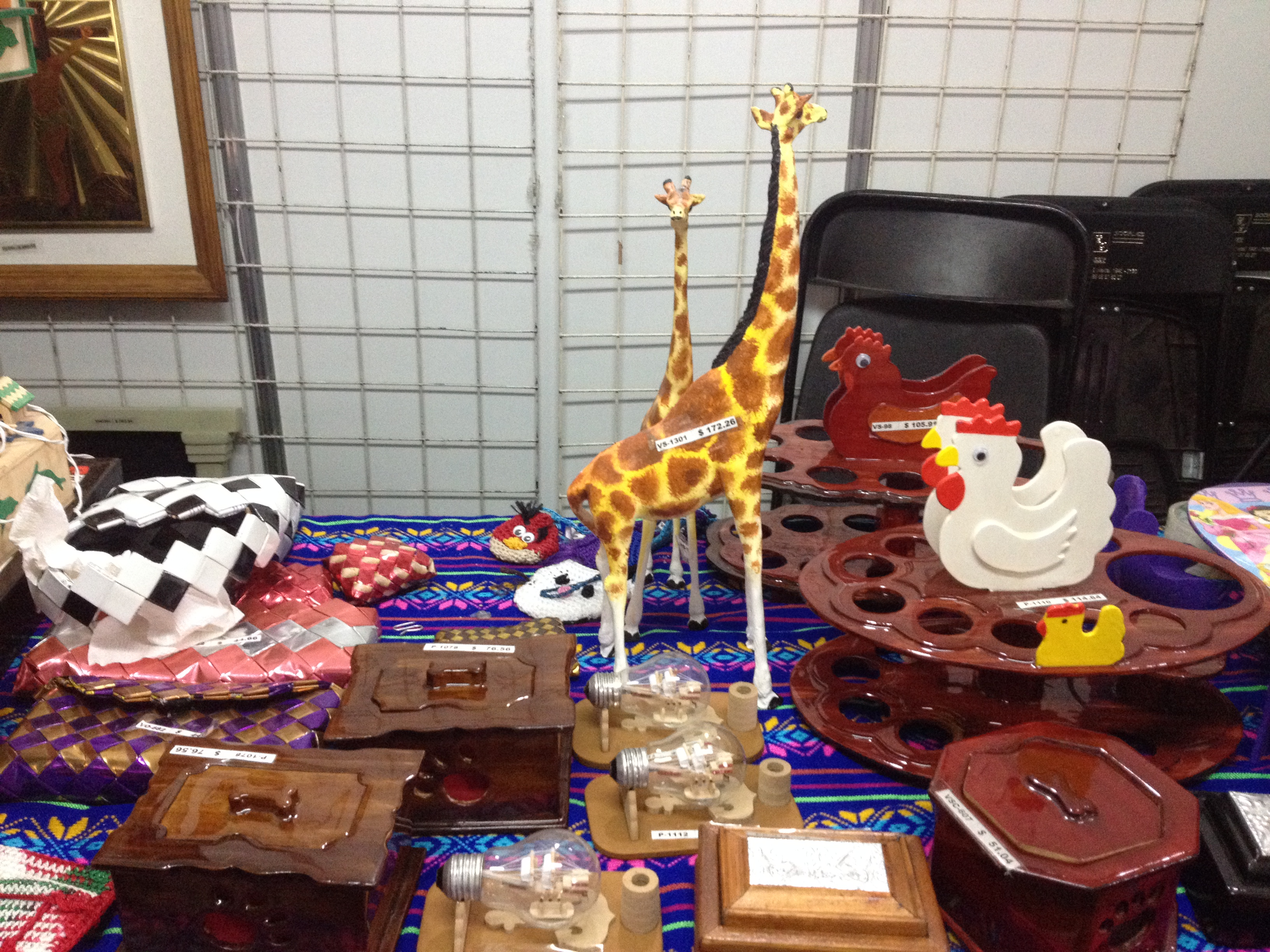 Juguetes hechos por los reclusorios del Distrito Federal, México